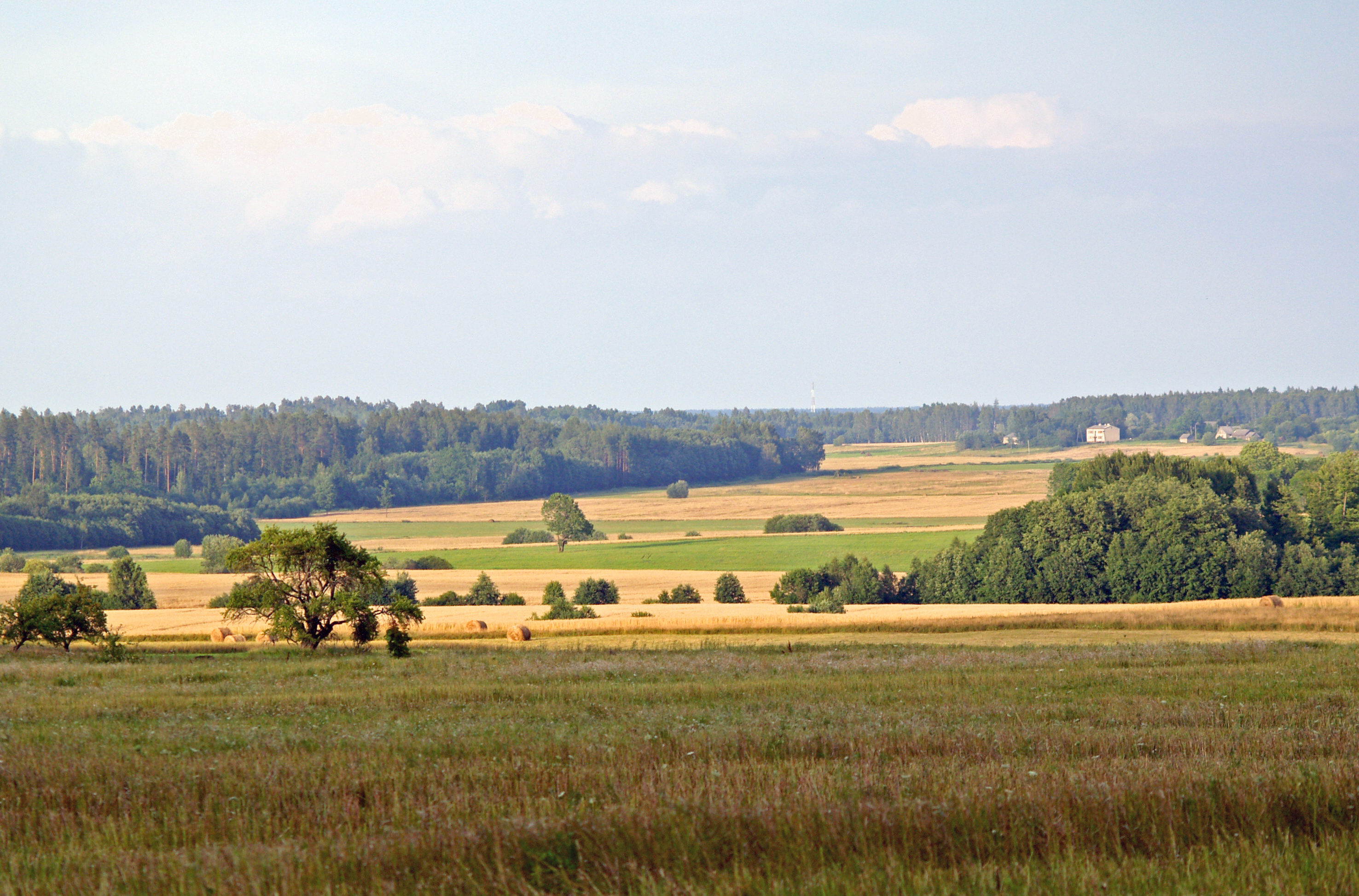 Nurmuižas apvidus (Nurmuiza area)